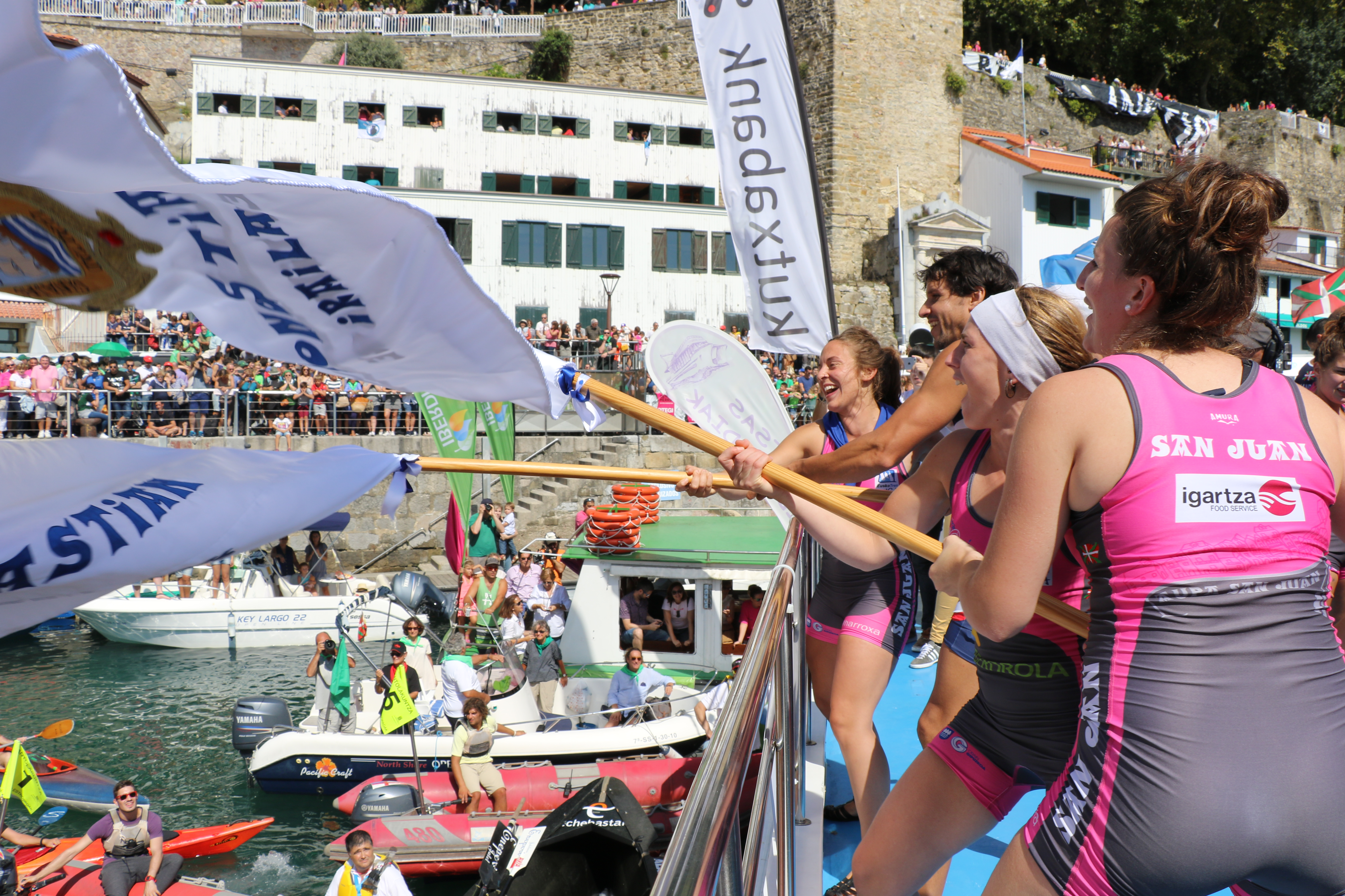 kontxa1-2